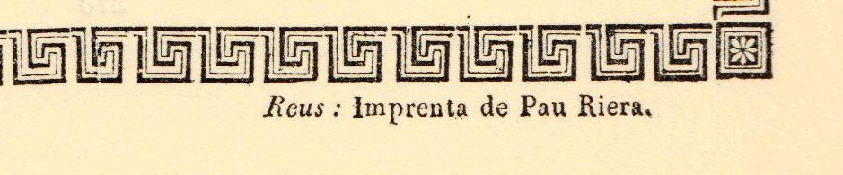 Peu d'impremta d'un goig de l'obrador de Pau Riera. 1828.